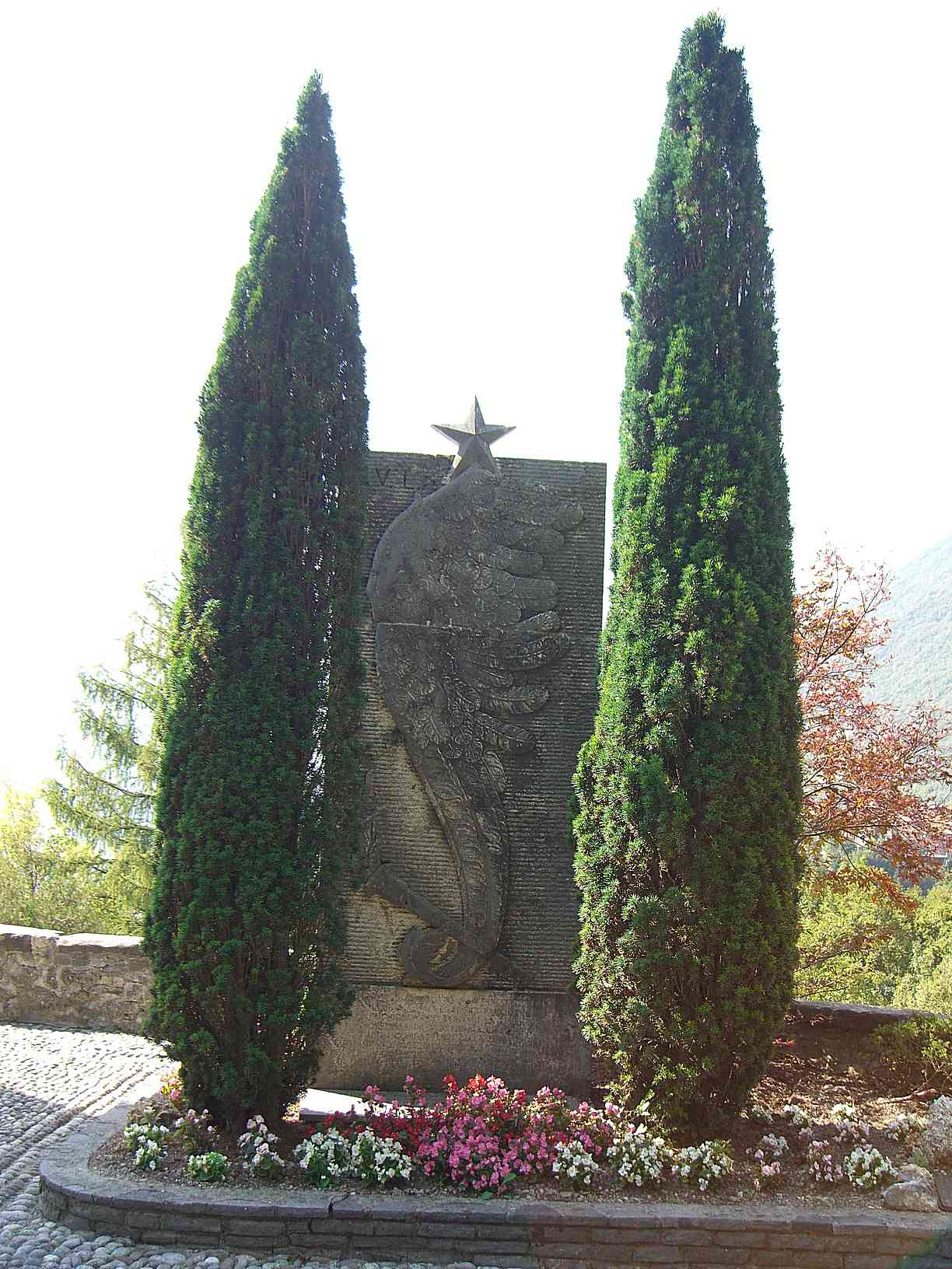 BG Ranzanico stele commemorativa della lotta per la Liberazione dai nazifascisti